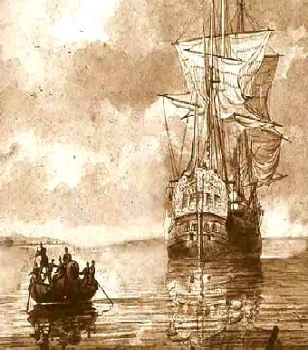 Representacion Artistica, de la Calma que precedío el Naufragio